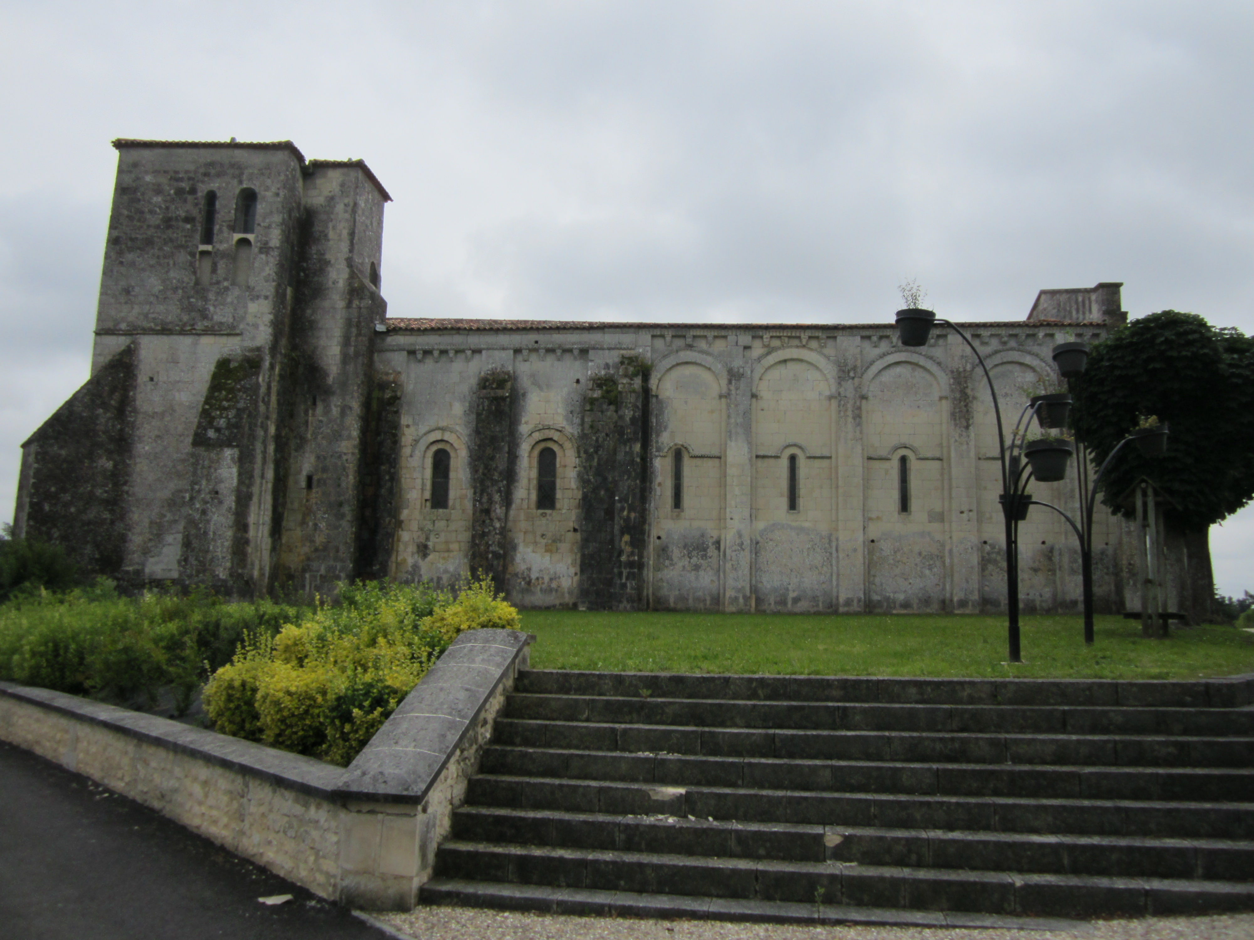 Église Saint-Léger de Saint-Léger en Charente .